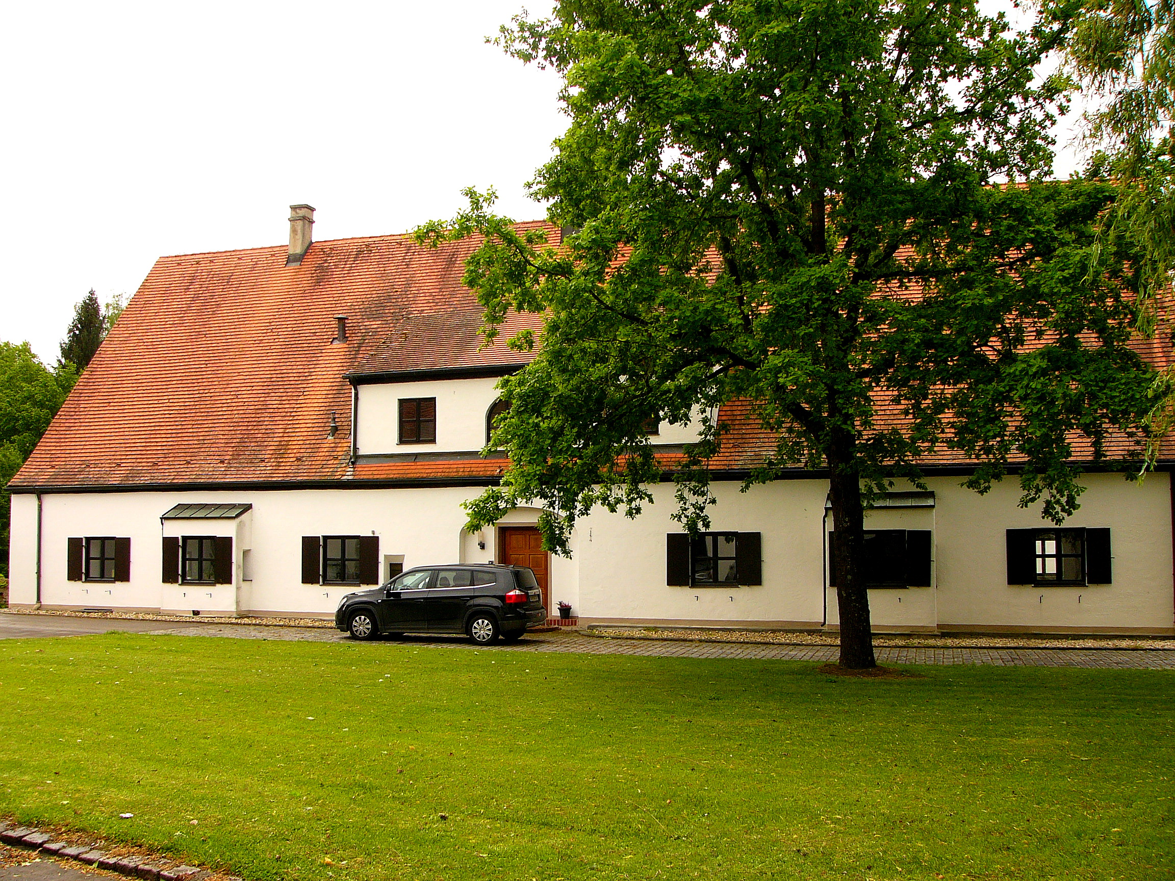 Wohnhaus eines Gutshofes; eingeschossig mit 2 Erkern, wohl 19. Jahrhundert.This is a photograph of an architectural monument.